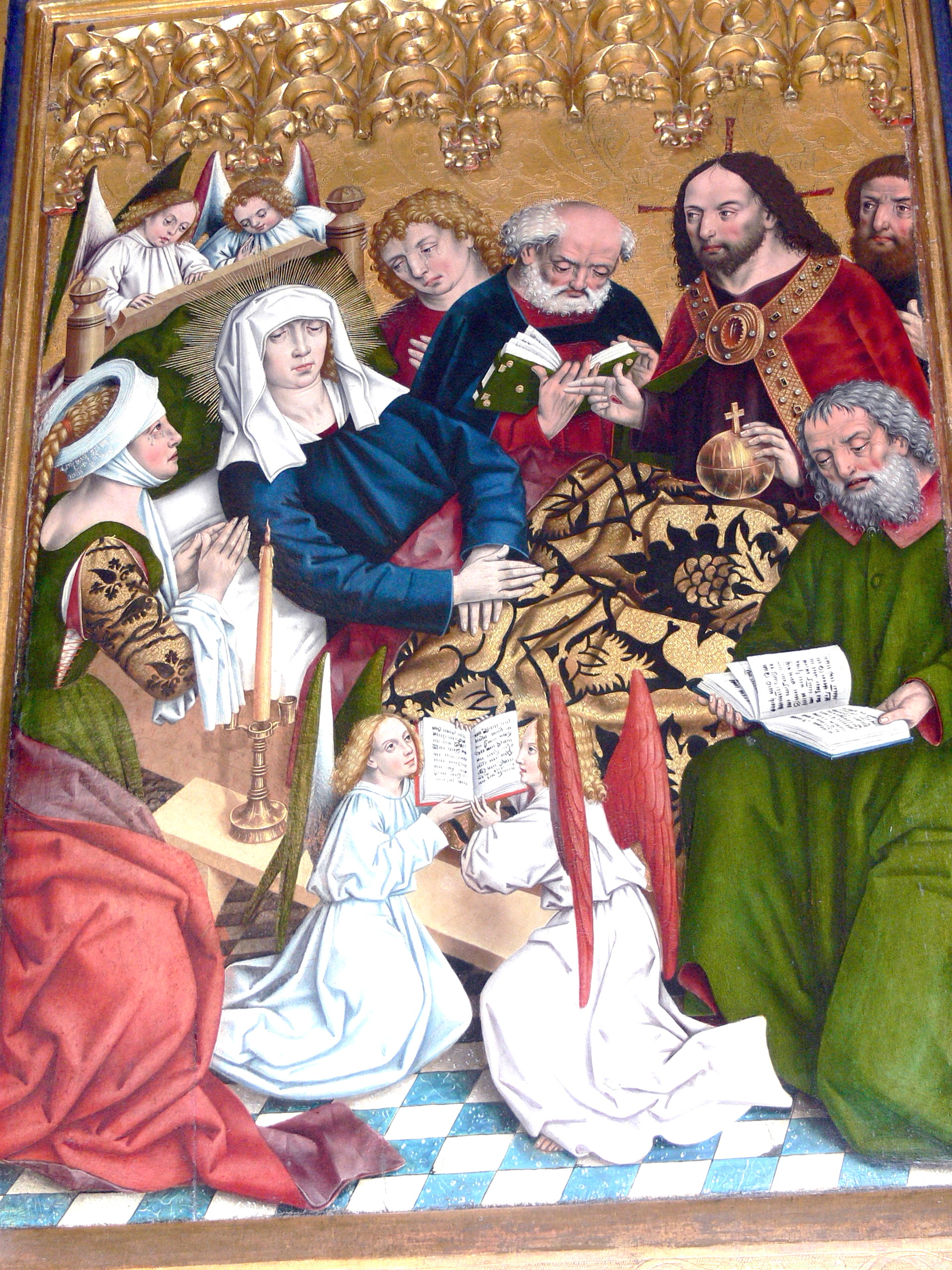 Hochaltar ( 1466 ) in St.Jakob in Rothenburg ob der Tauber. Tod Mariens von Friedrich Herlin